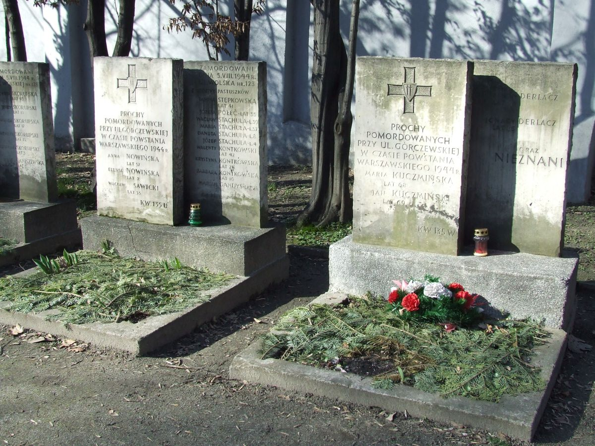 Cmentarz Powstańców Warszawy, groby ludności cywilnej zamordowanej w czasie rzezi Woli